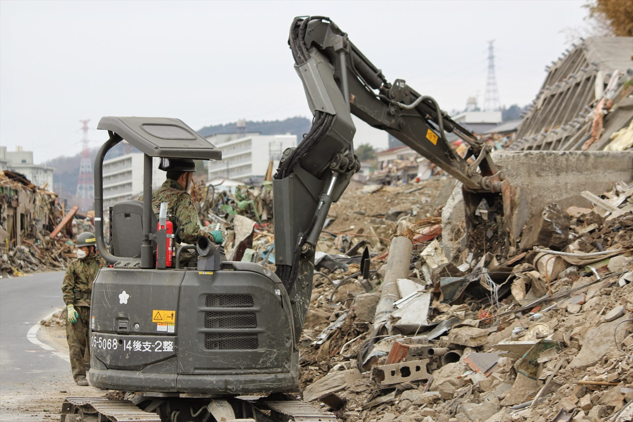 小型ショベルドーザ（災害派遣活動）